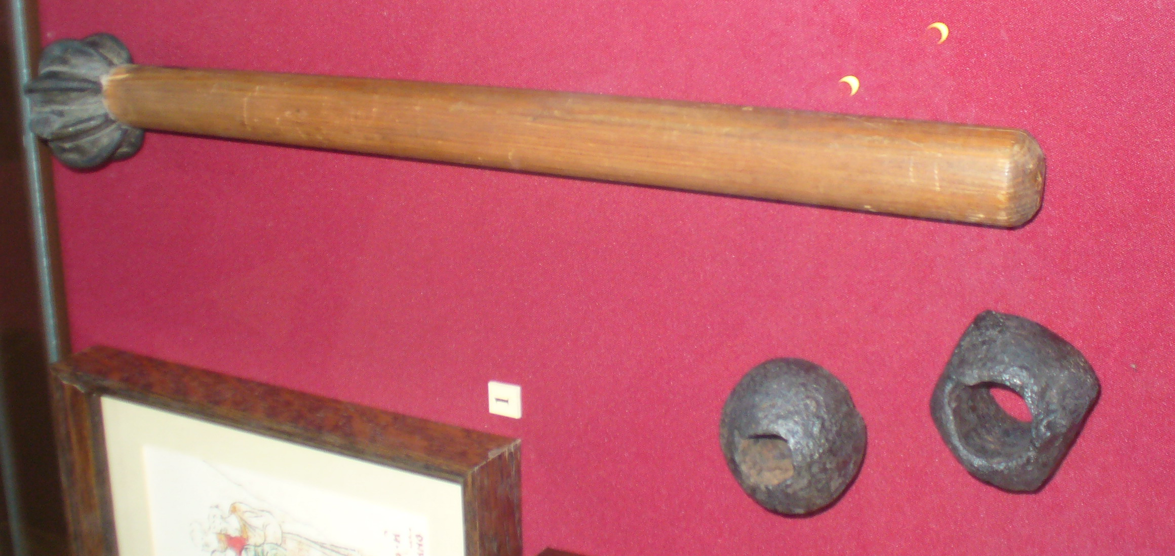 Многолопастная булава и навершия булав, Русь, XII-XIII в.